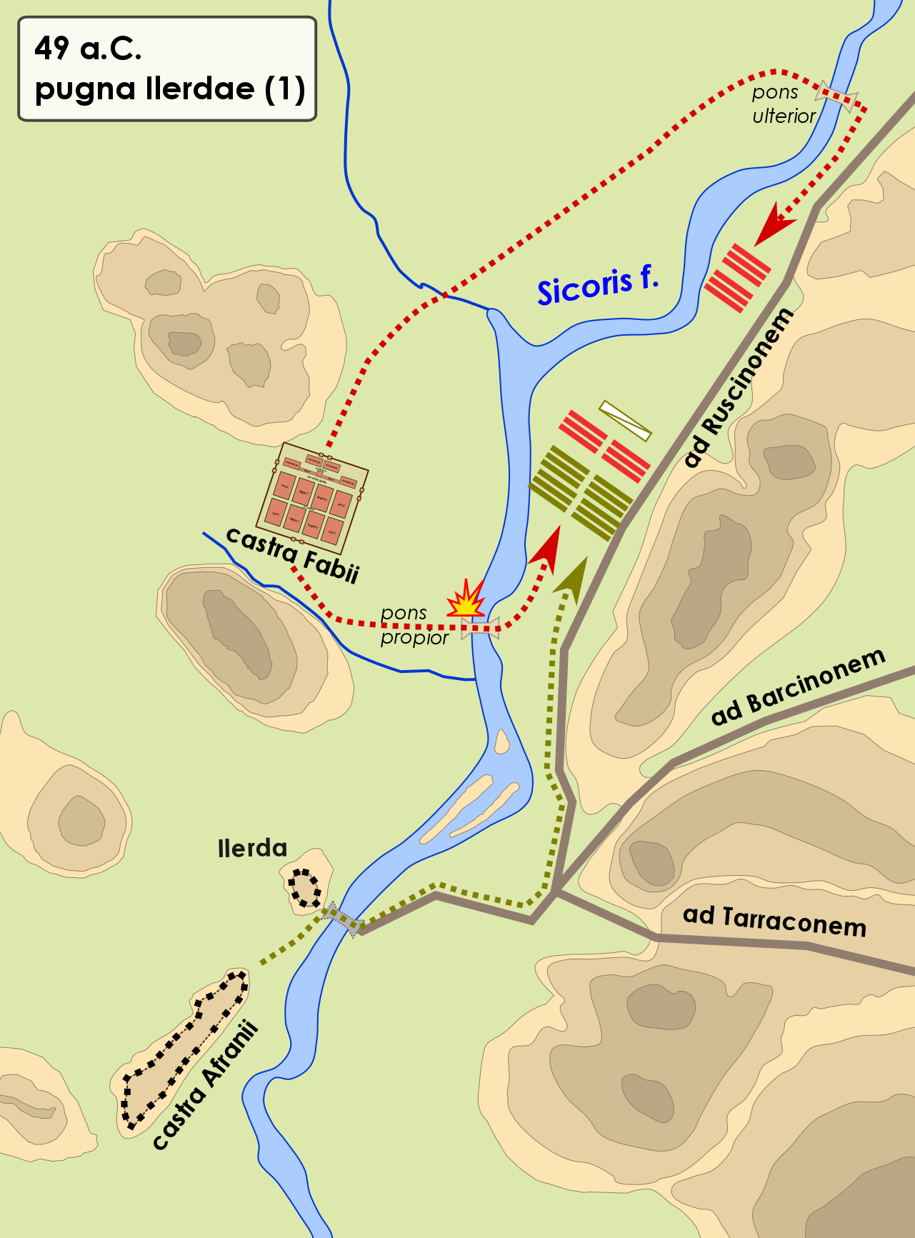 Prime fasi della campagna militare che vide Cesare protagonista in Spagna nel giugno-agosto del 49 a.C.